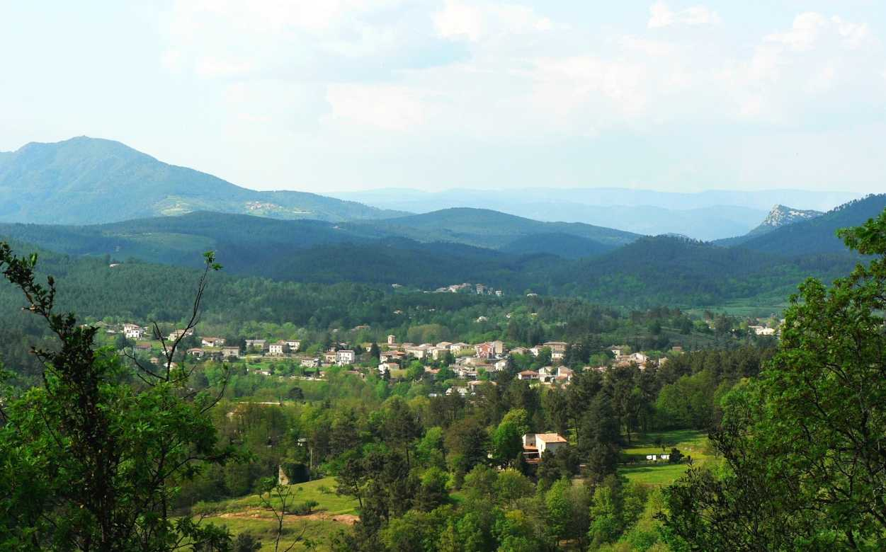 Vue de Gagnières, Dep. Gard, France Description Vue generale de Gagnières, Dep. Gard, France Date23 April 2007SourcePhoto pris depuis le chemin de La Pignatelle à la ruine du chateau de CastillonAuthorLeo Kowald, Gelsenkirchen et Gagnières, 124 rue de la cave coopérative Vue generale de Gagnières, Dep. Gard, France